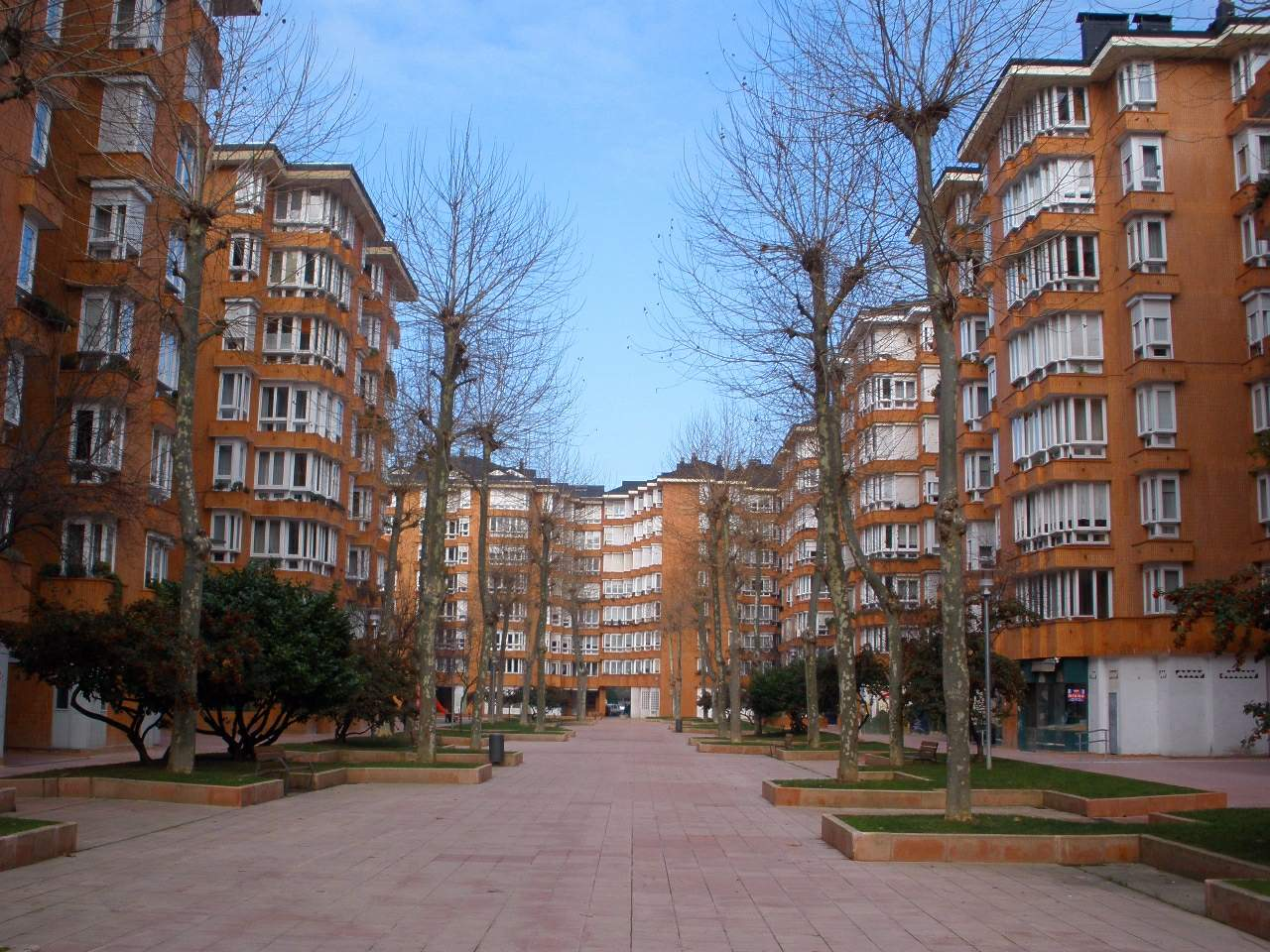 Casas en el barrio de San Martín, Vitoria-Gasteiz